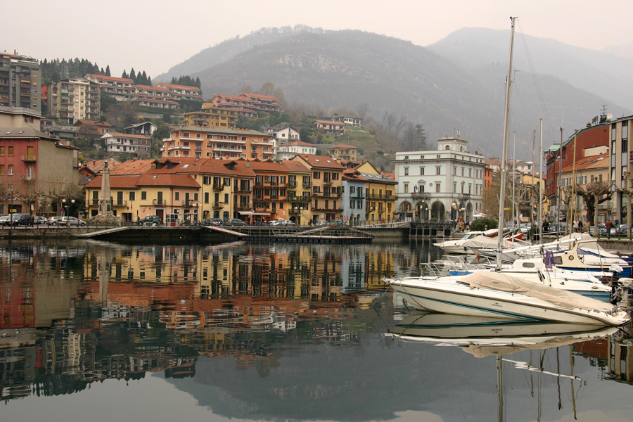 Veduta di Omegna (VB), affacciata alla testa del Lago d'Orta